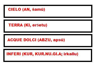 Le quattro regioni dell'universo (sumerico: an-ub-da-limmu-ba; accadico: kibrāt arbāʾi) nella cosmologia mesopotamica. Da tener presente che i nomi riportati in parentesi (maiuscolo per il sumerico, minuscolo per l'accadico) per quanto inerisce alle regioni della "terra" (superficie terrestre) e agli Inferi (regione dei morti e delle divinità infere) sono più numerosi e spesso sovrapponibili tra i due livelli. Gli altri nomi sumerici sono: a-rá, arali, bùr, ganzer, idim, ki, kir5, kiš, kur, kur-gi, lam/lamma, lamḫu, uraš, urugal/erigal. Gli altri nomi accadici sono: ammatu, arali/arallu, danninu, eršetu, kanisurra, irkalla, kiūru, lammu, qaqqaru.